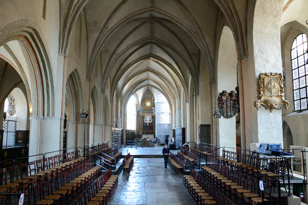 Stockholm, Riddarholmskyrkan, Hauptschiff